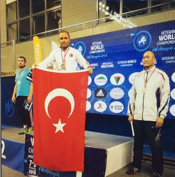 Kadir Gırdoğlu 2016 Avrupa Veteranlar Güreş Şampiyonası